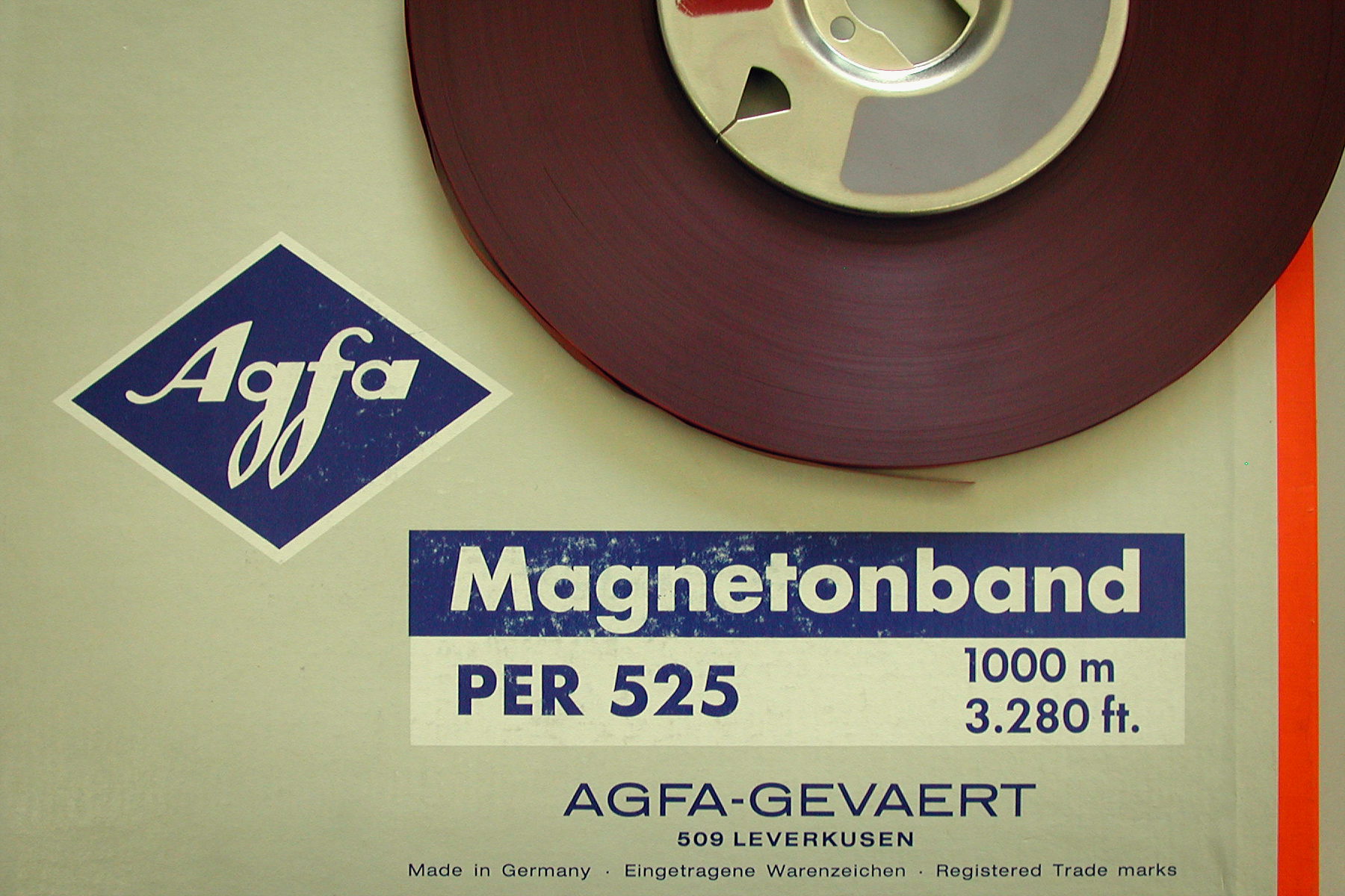 Professionelles Magnettonband PER 525 von Agfa-Gevaert aus den 1970er Jahren